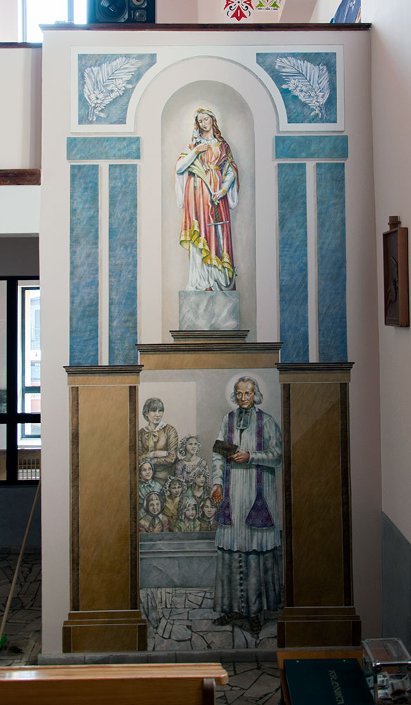 Fresk przedstawiający Świętą Filomenę oraz Świętego Jana Marię Vianney'a, znajdujący się w Sanktuarium Świętego Jana Marii Vianney'a w Mzykach, niedaleko Koziegłów, województwo śląskie.